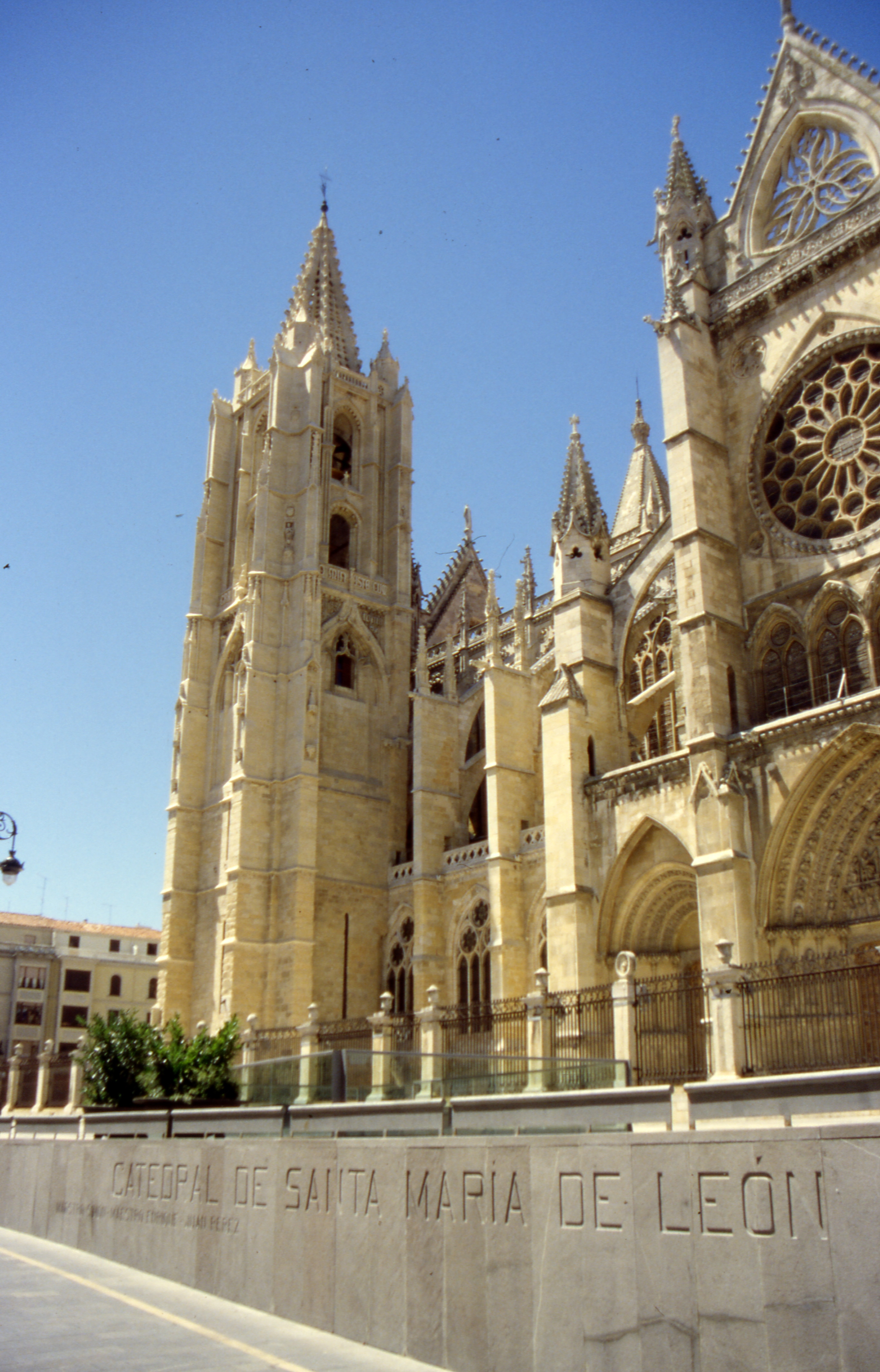 LeónKathedraleSantaMaria2001